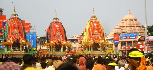 culture of odissa and its beauty